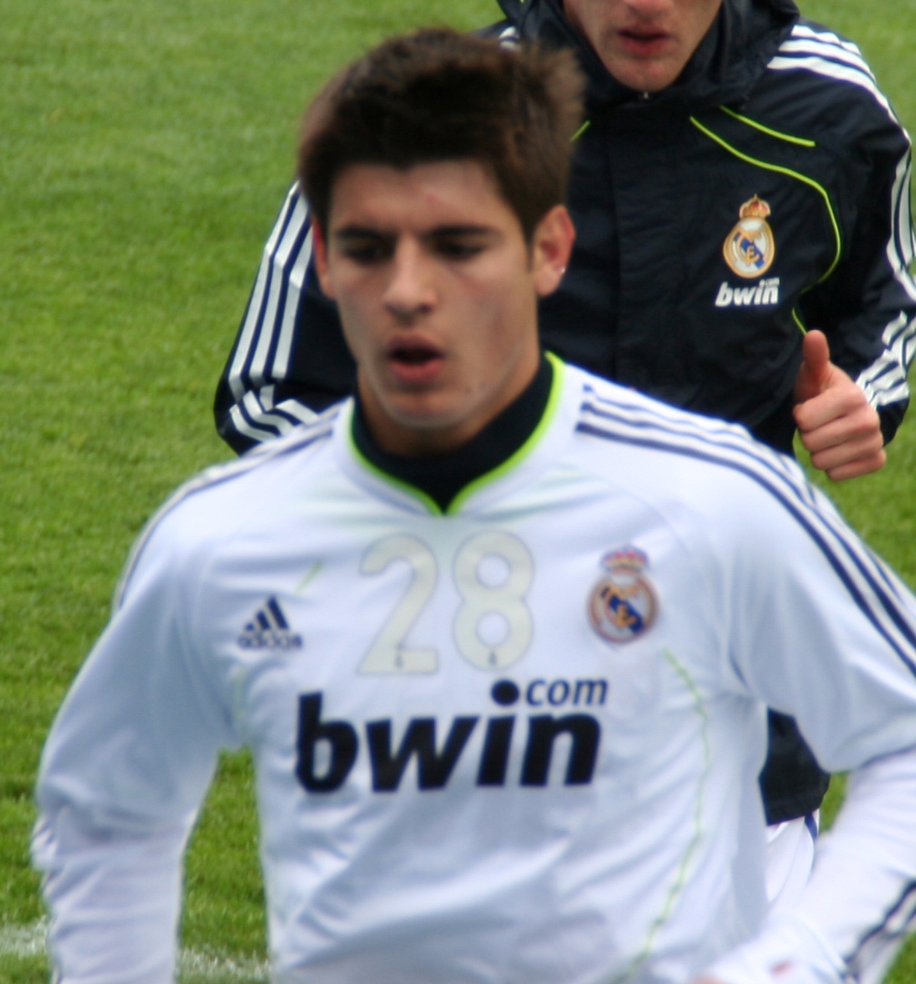 Morata minutos previos al Real Madrid Castilla - Leganés